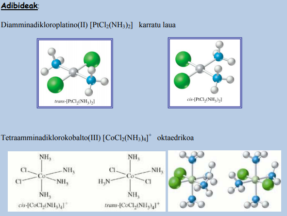 Isomero geomterikoen adibideak